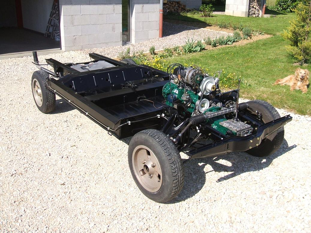 Châssis équipé de sa mécanique